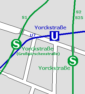 de: Karte der Berliner S- und U-Bahn Station Yorckstraße nl: Kaart van het Berlijnse metro- en S-Bahnstation Yorckstraße